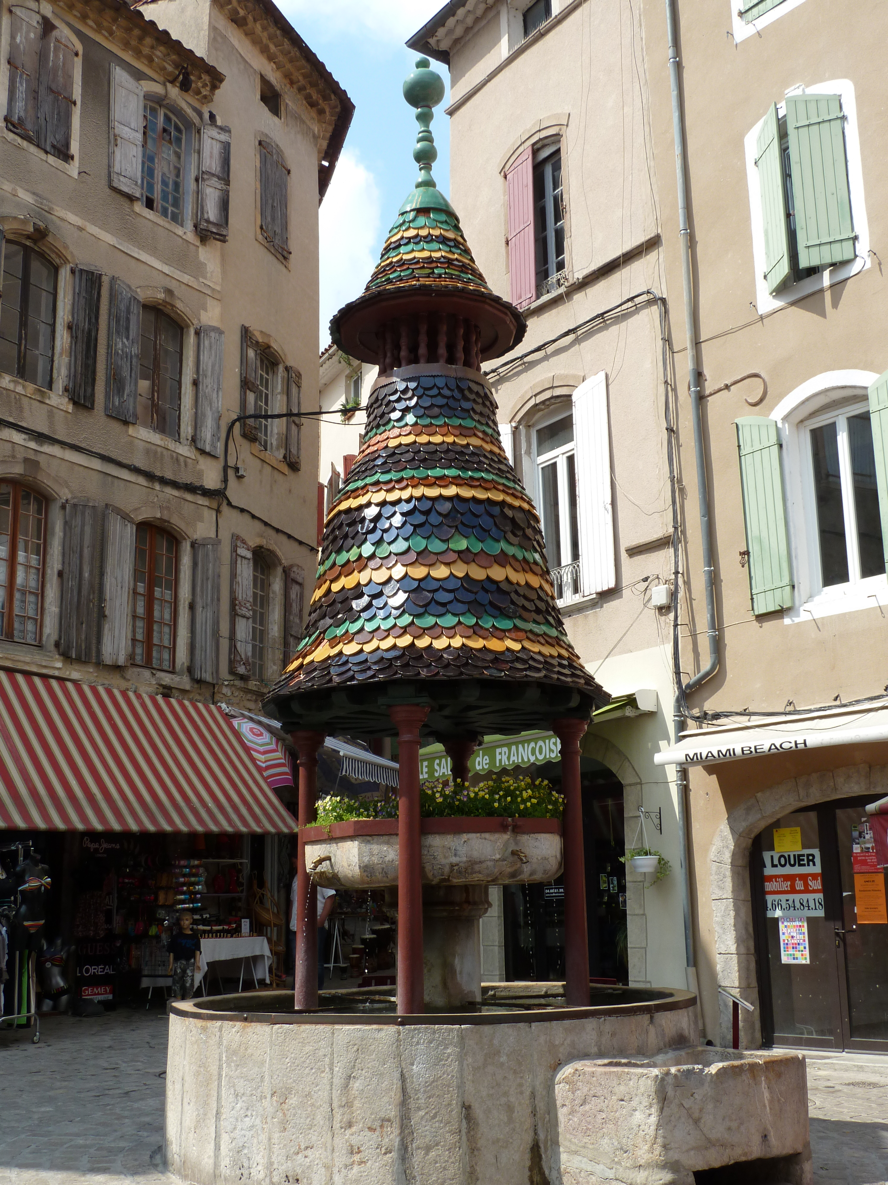 Fontaine Pagode à Anduze, commune située dans le Gard (France).